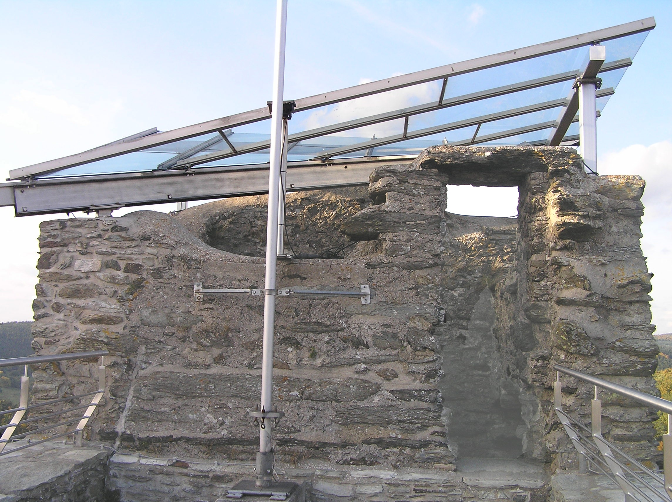 modernes Dach der Burg Reifenberg, Oberreifenberg, Deutschland